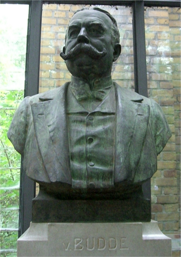 Martin Goetze - Büste Hermann von Budde